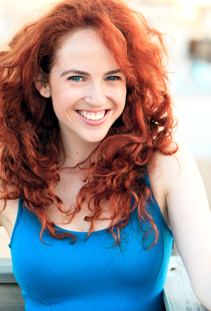 לאה גלפנשטיין